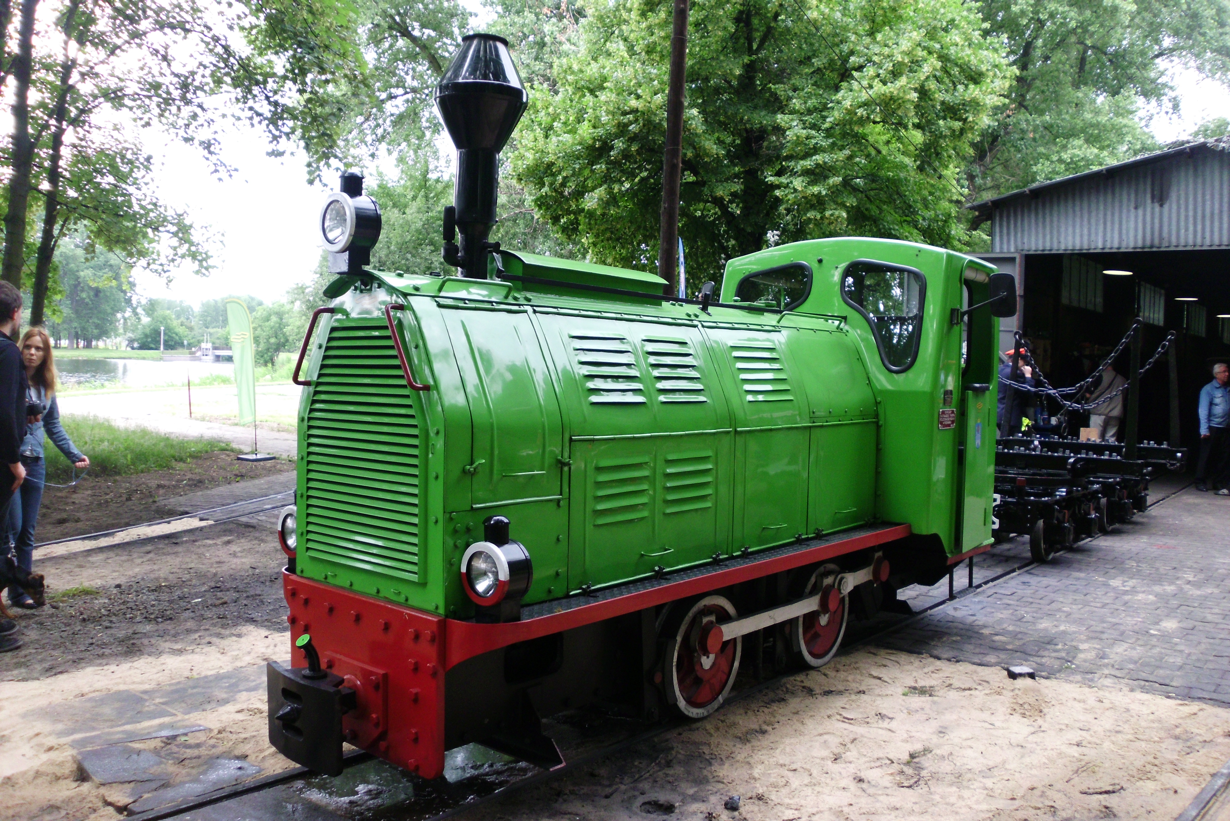 15 lat służby Borsiga na Maltance